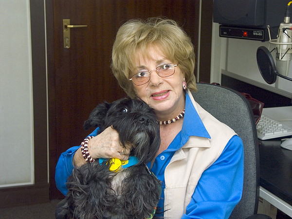 Zofia Czerwińska, polska aktorka (z psem o imieniu Dżek).